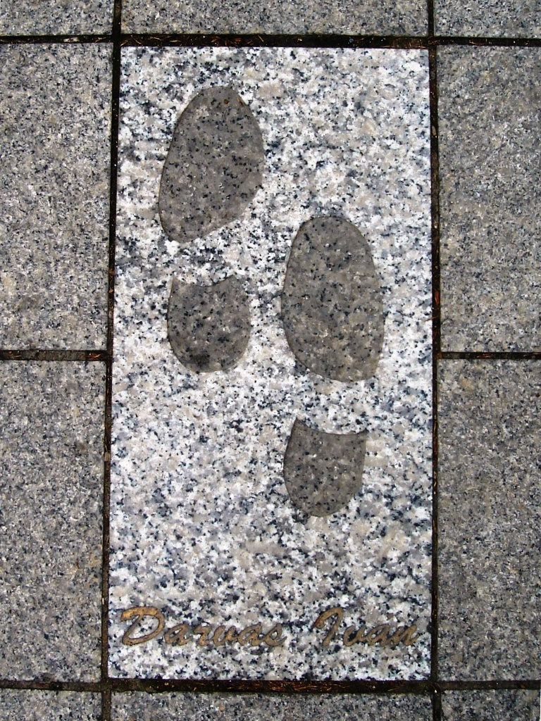 Darvas Iván színművész, a Halhatatlanok Társulata Örökös Tagjának lábnyoma a Budapesti Operettszínház előtti járdán. (Budapest)